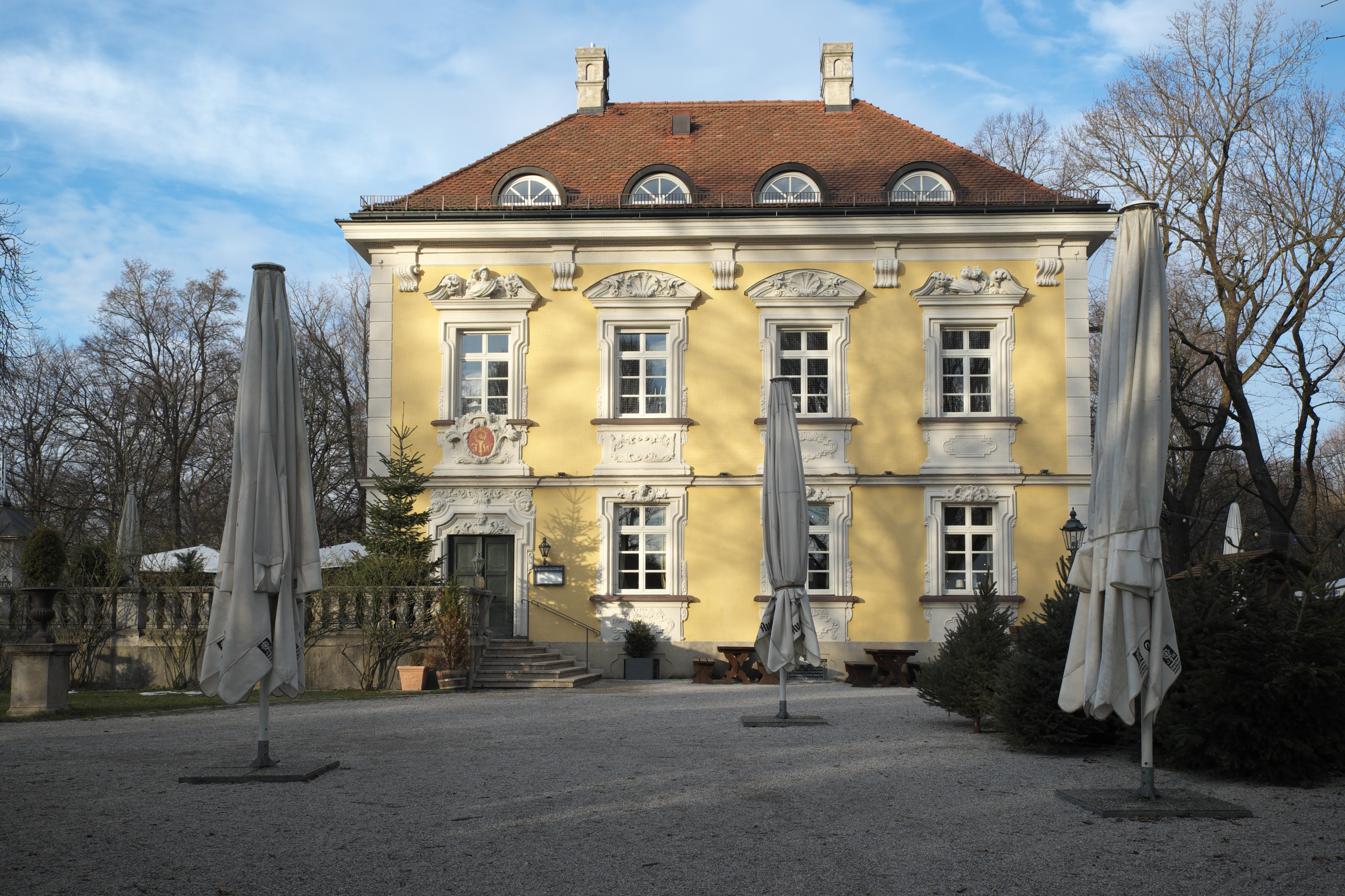 Bamberger Haus im Luitpoldpark im Stadtbezirk Schwabing-West in München (Bayern/Deutschland)